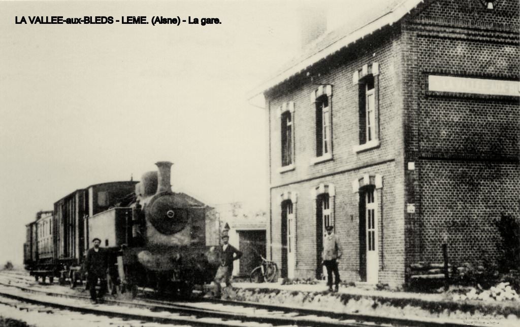 Carte postale de l'ancienne gare